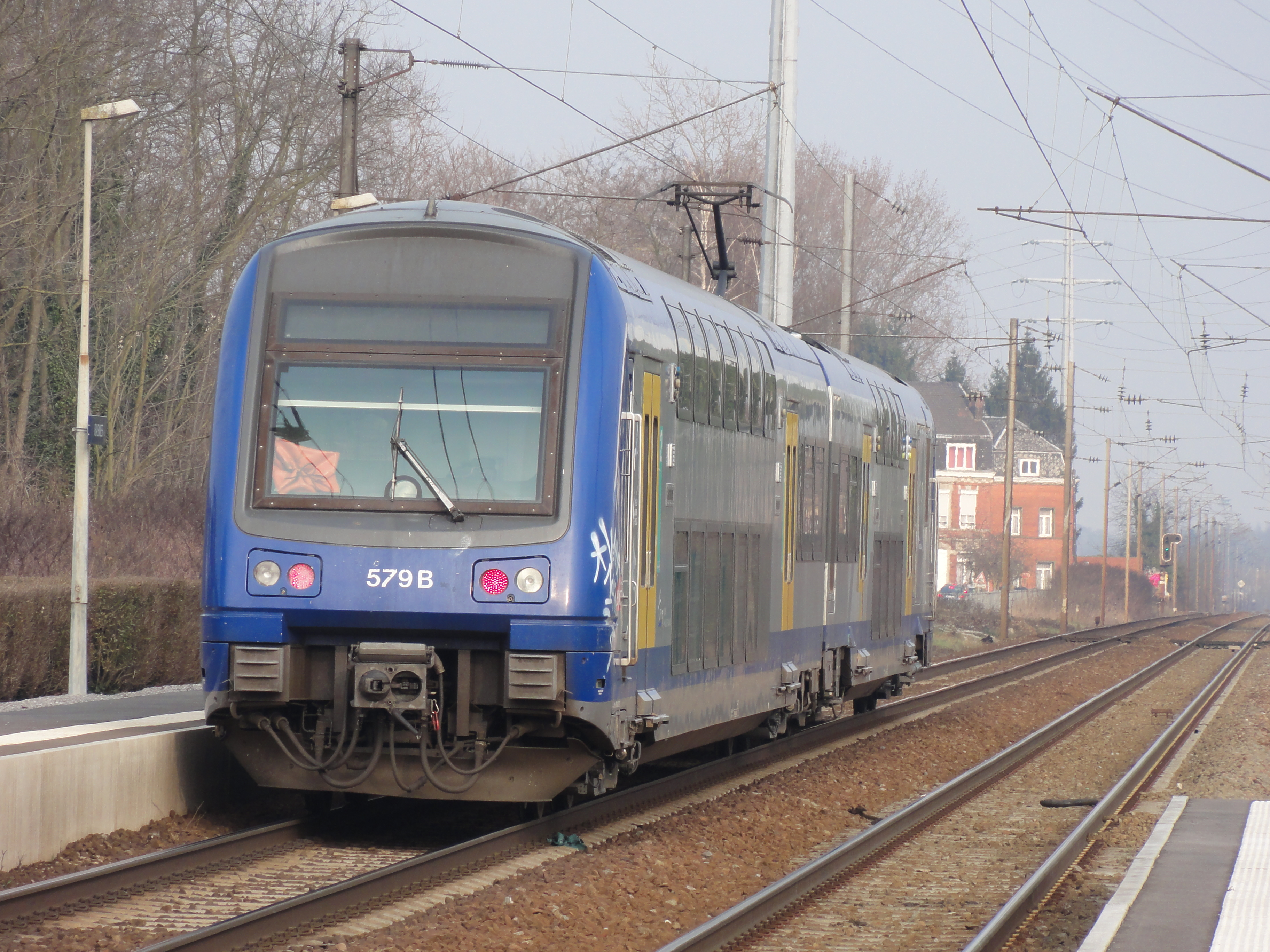 Gare de Raismes, Nord, Nord-Pas-de-Calais, France. Z 23500 du TER Nord-Pas-de-Calais.